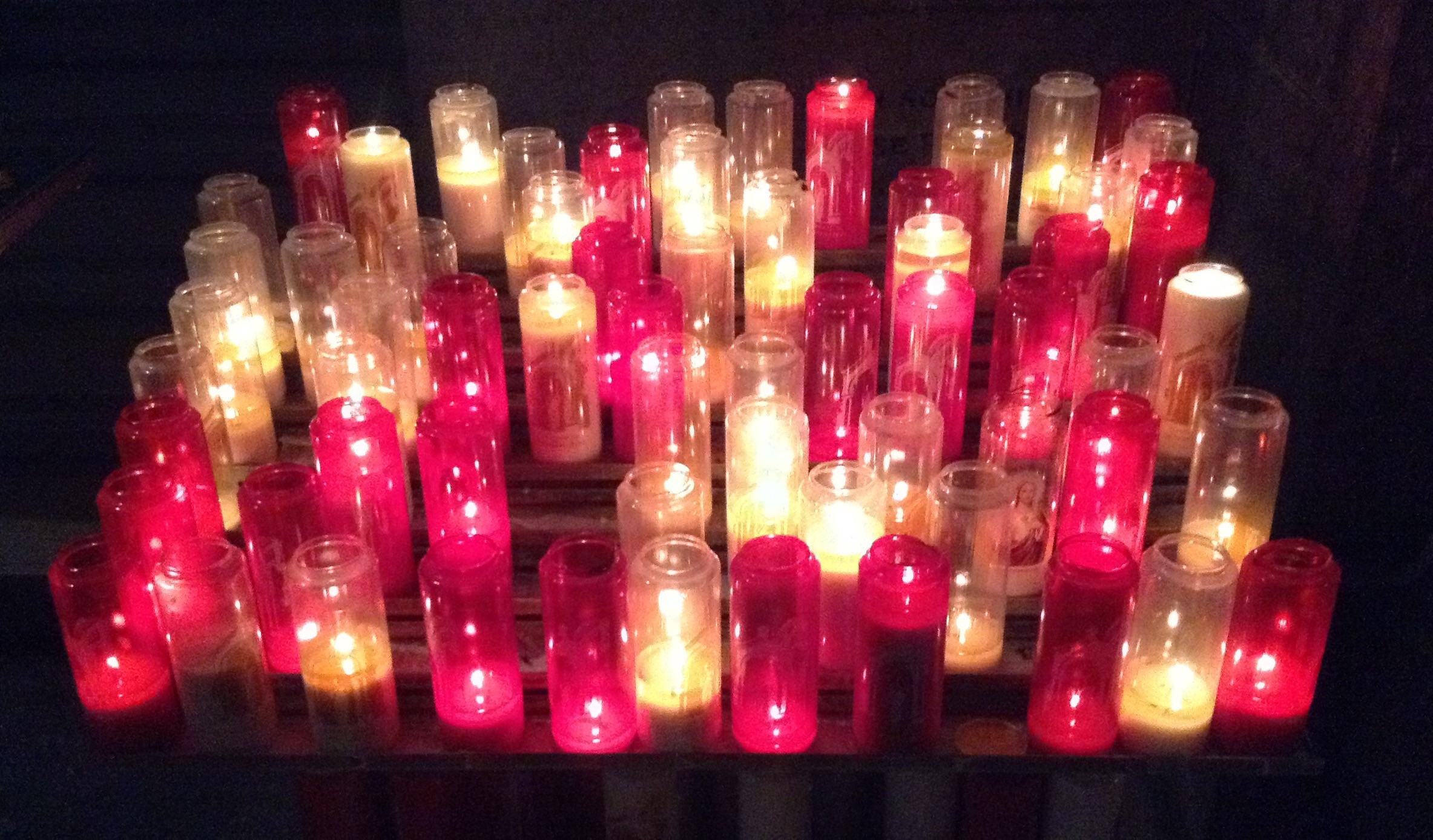 Adoration perpétuelle à la Basilique du Sacré-Cœur de Montmartre